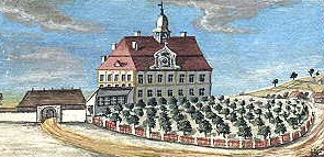 nejstarší vyobrazení chocenického zuámku